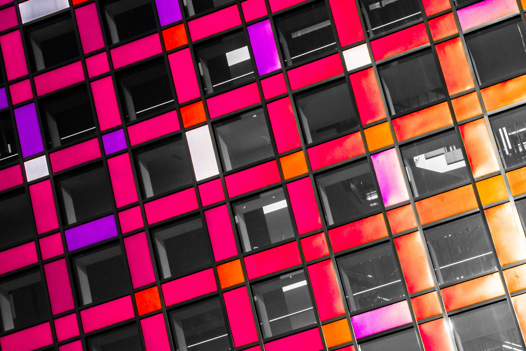 Details aus der Außenfassade des Hauptbaus des Ruperti-Gymnasiums